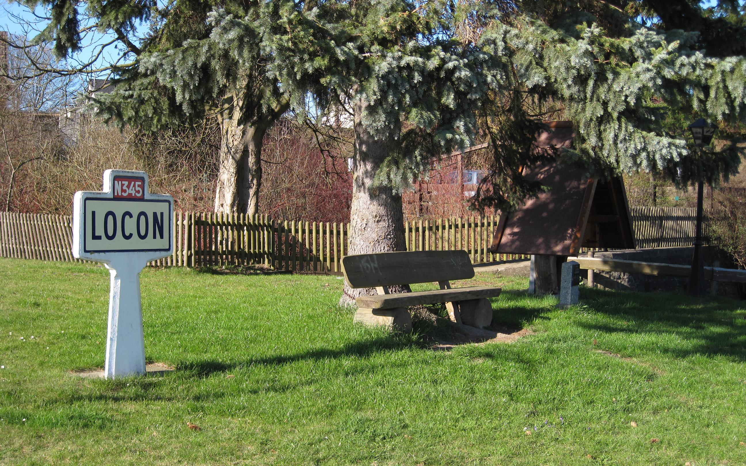 Loconer-Platz in Menden (Sauerland)-Oesbern, Haböcken/Ecke Oberoesbern.